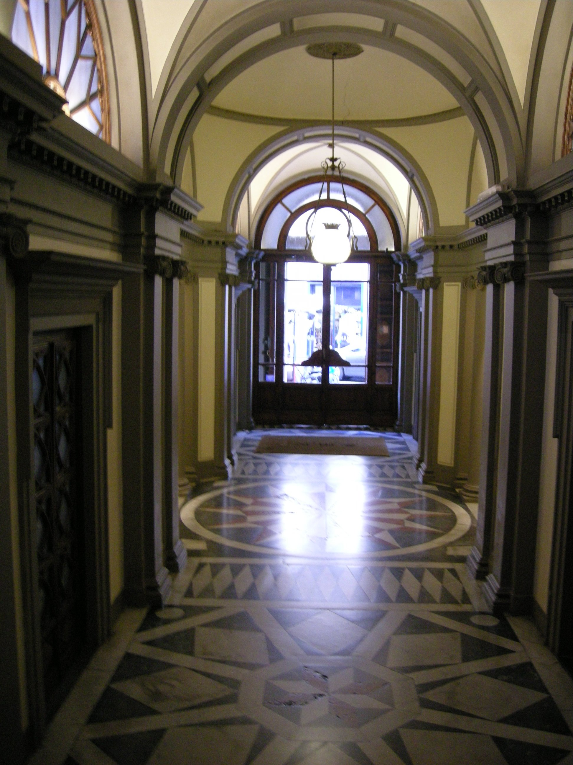 Farmacia di smn, vestibolo